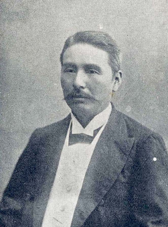 Suzuki Tōzaburō 鈴木藤三郎